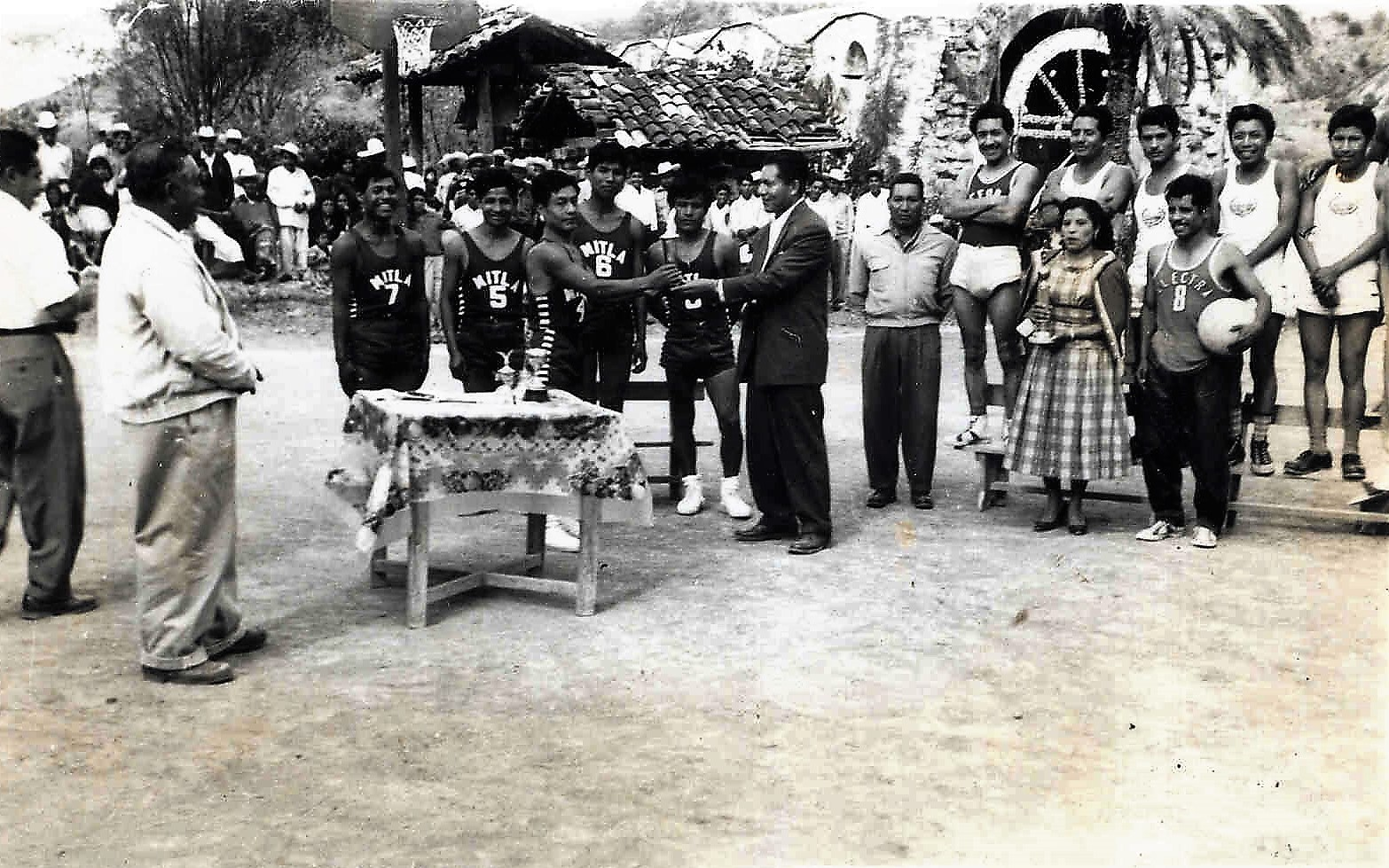 Premiación a equipos de basquetbol, fiesta patronal de San Juan Achiutla, Oaxaca, México, 1957